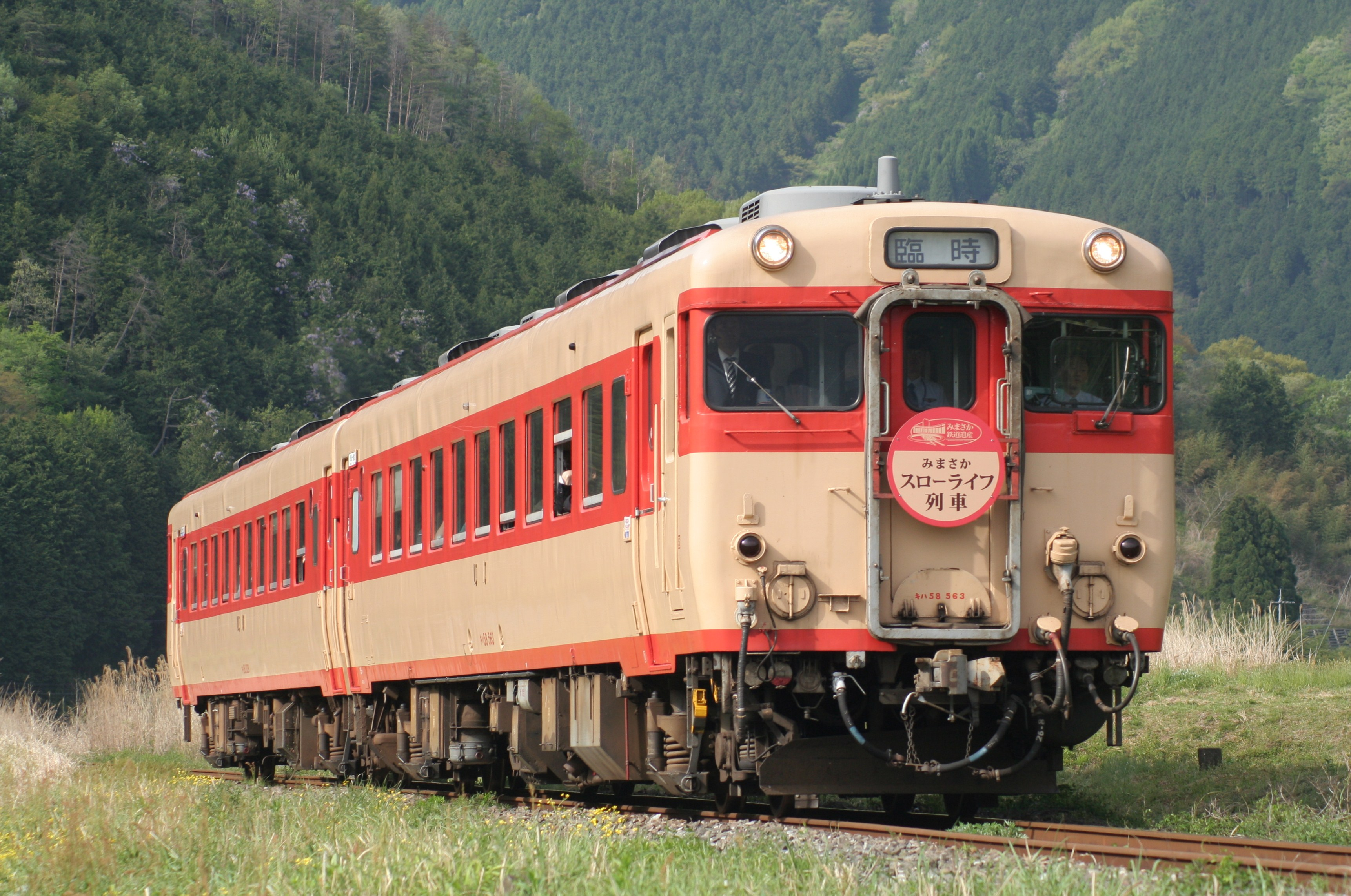 JR西日本キハ58系気動車 みまさかスローライフ列車 キハ58-563+キハ28-2329 因美線 美作加茂 - 知和